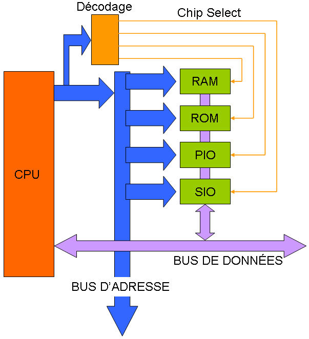 Title : Chip Select.